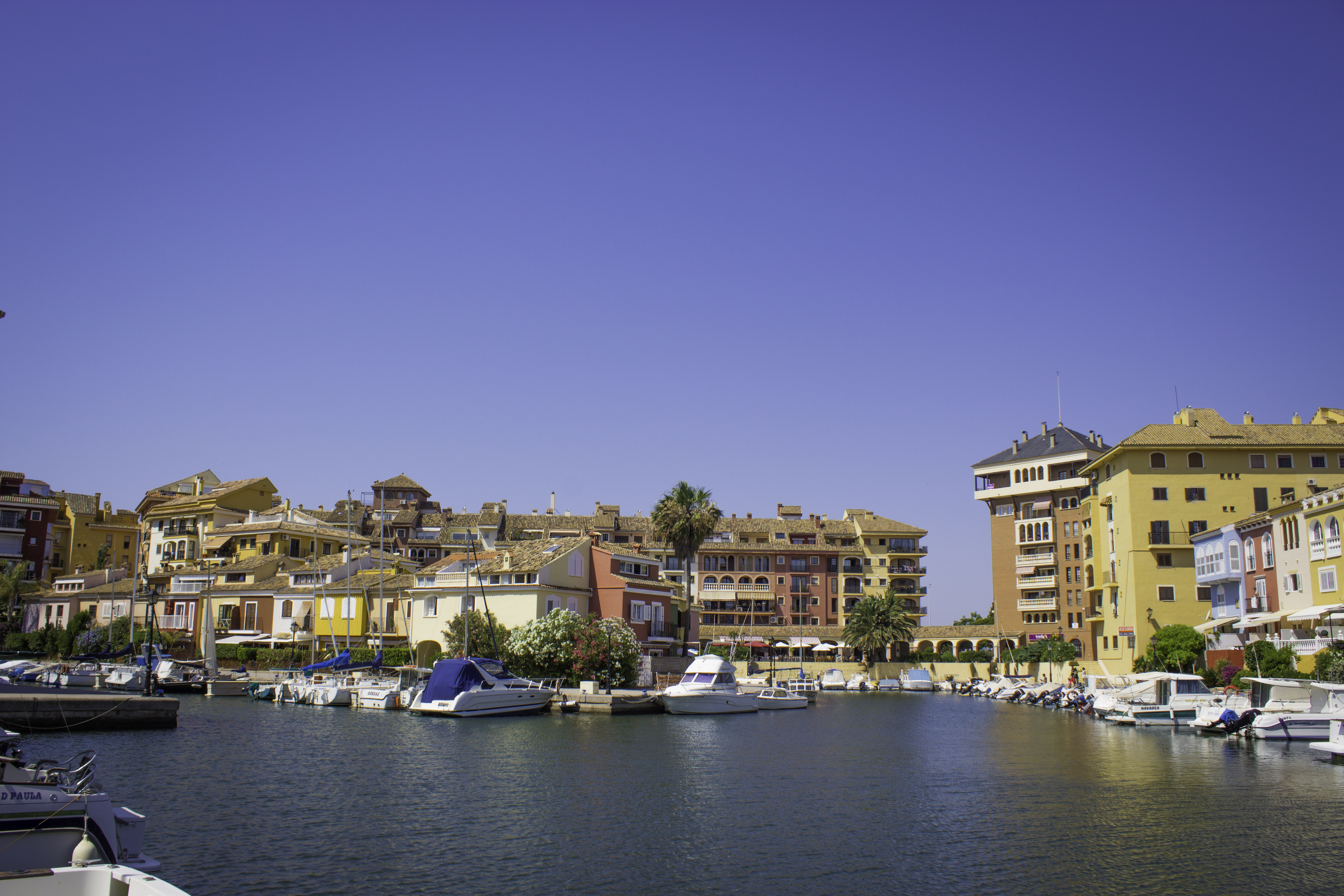 Imagen del club nautico del port saplaya